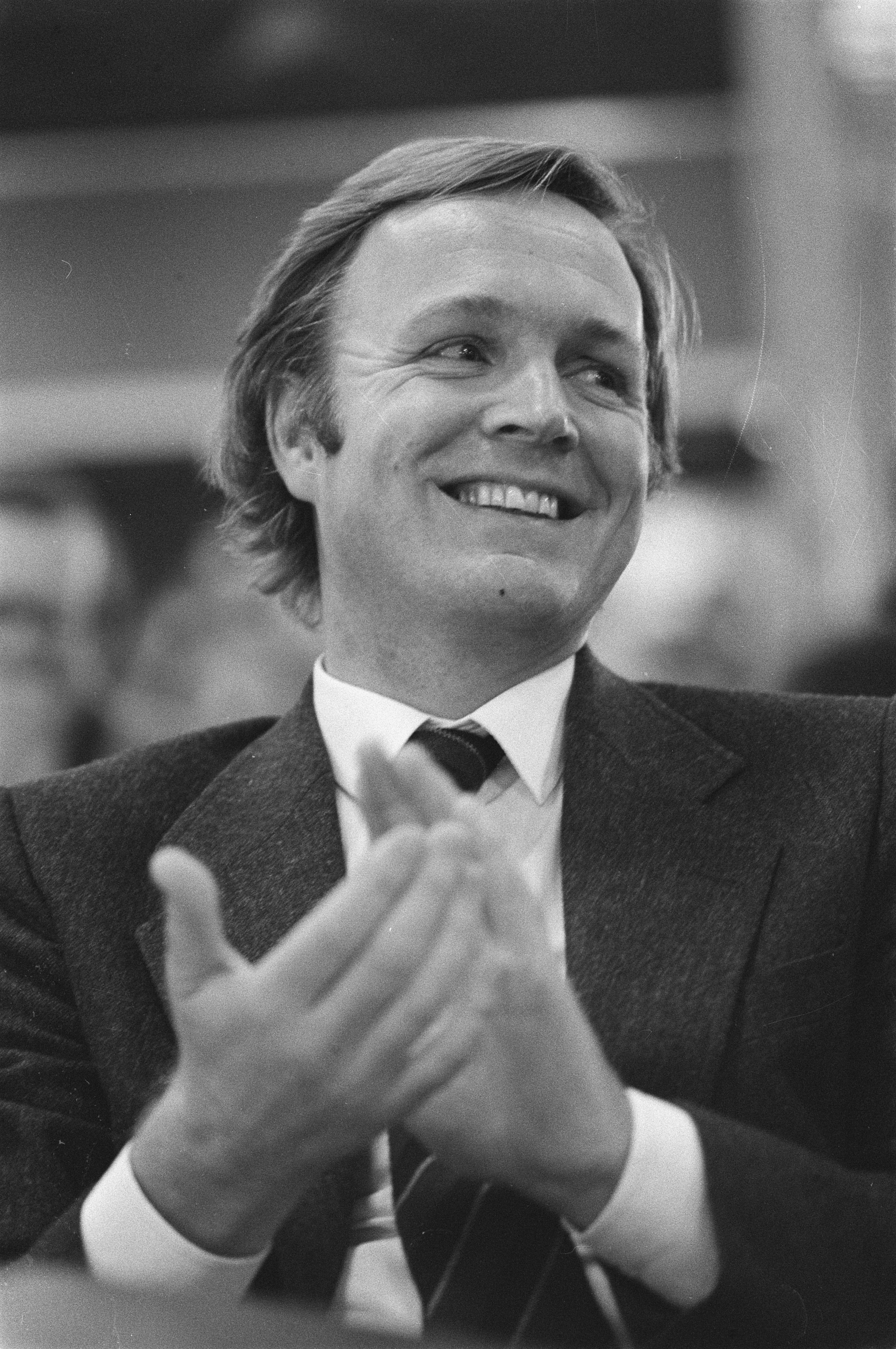 Ledenvergadering D66 in Utrecht; Jan Terlouw , kop